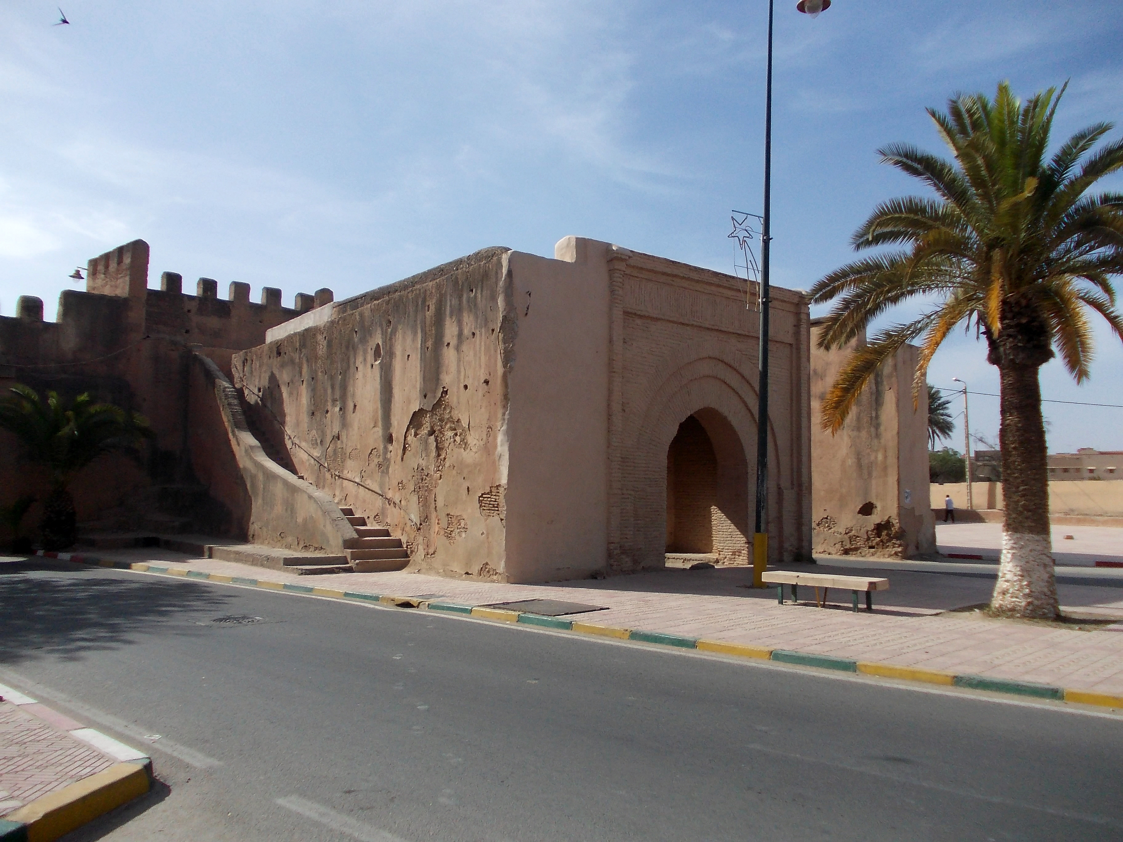 Marokko- Agadir- Taroudant - Stadttor